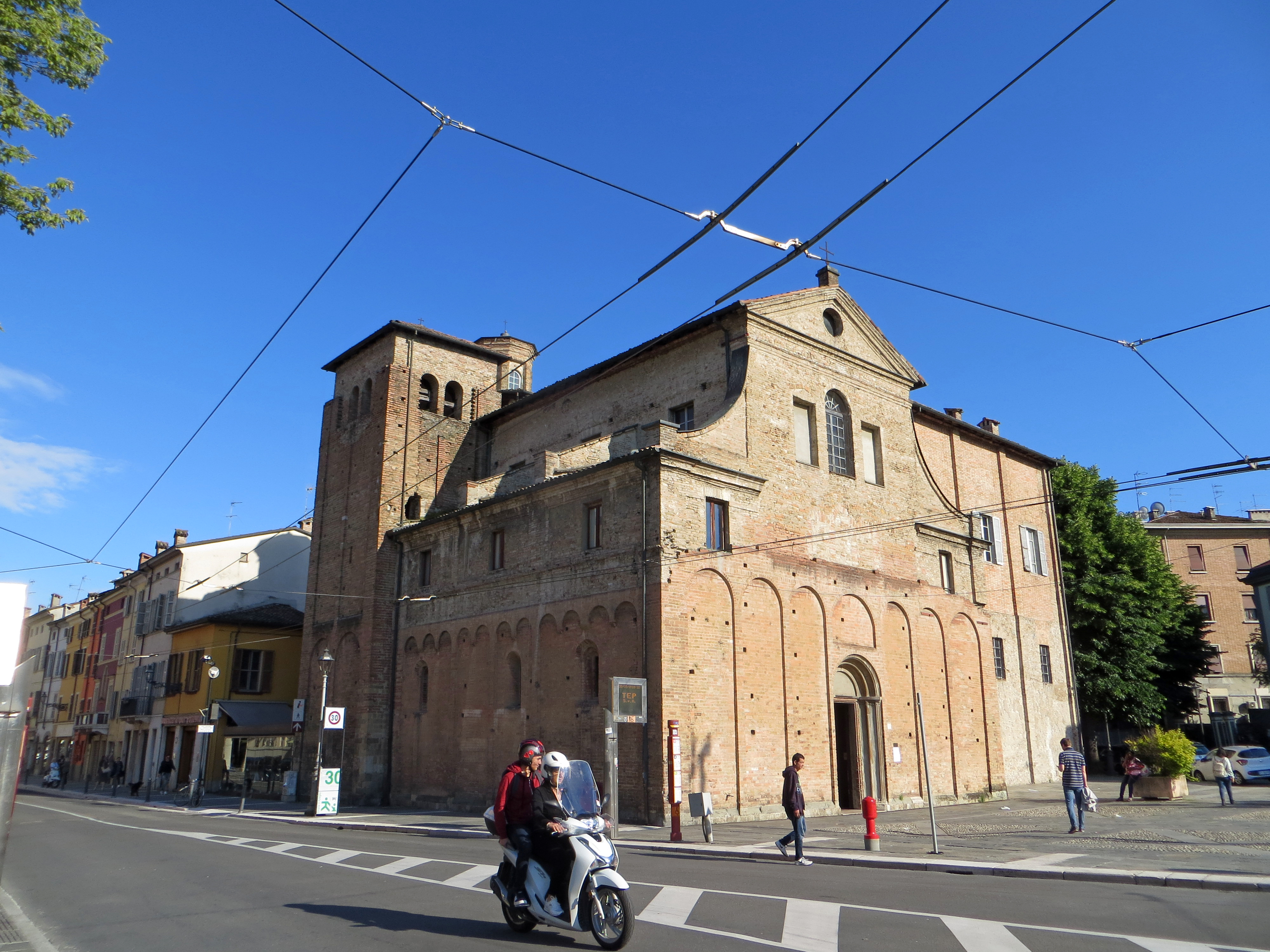 Chiesa di Santa Croce (Parma) - esterno